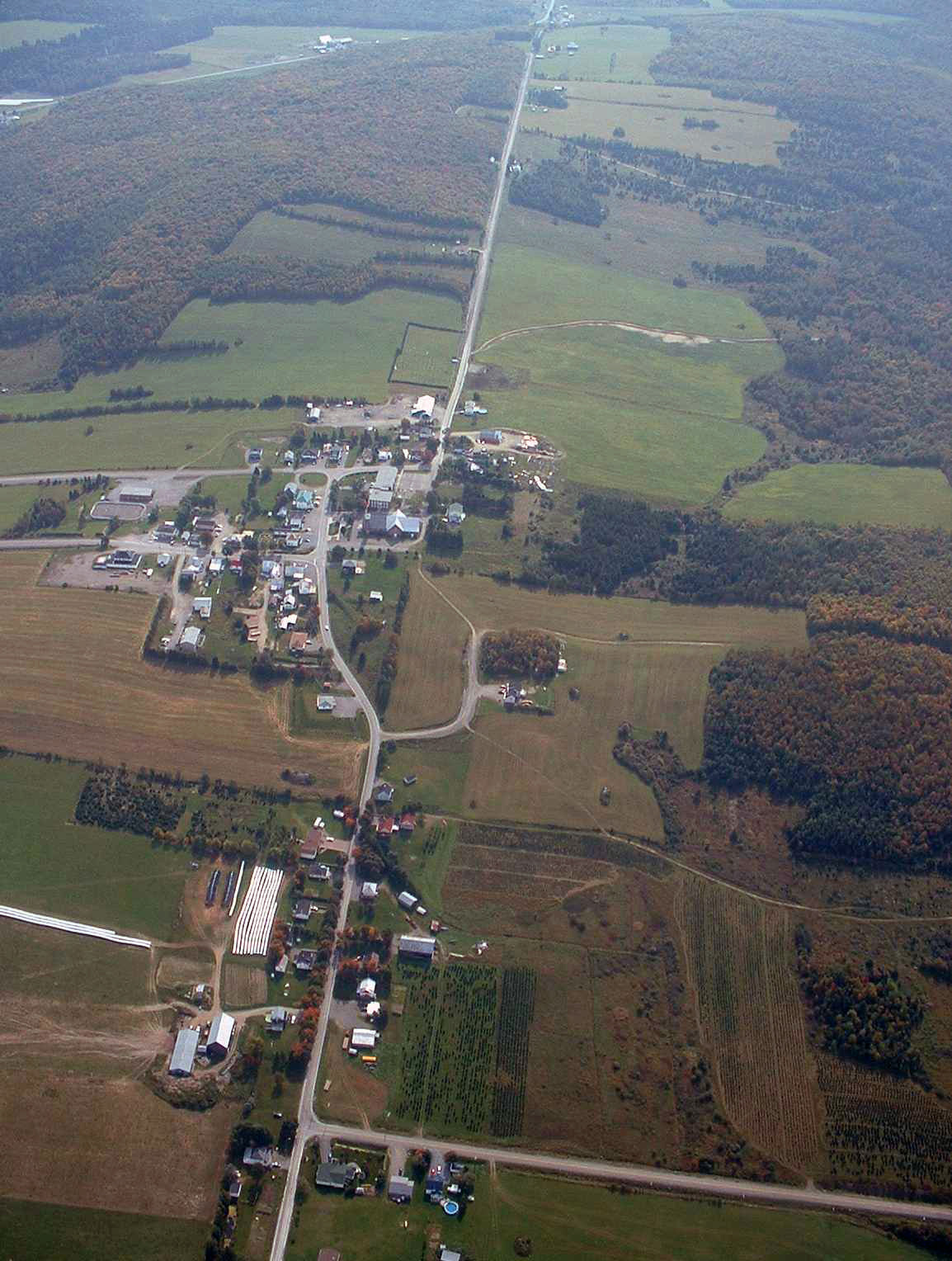 Vue aérienne du village de Packington au Témiscouata (Québec, Canada). Août 2003. Auteur : Nicolas Gagnon